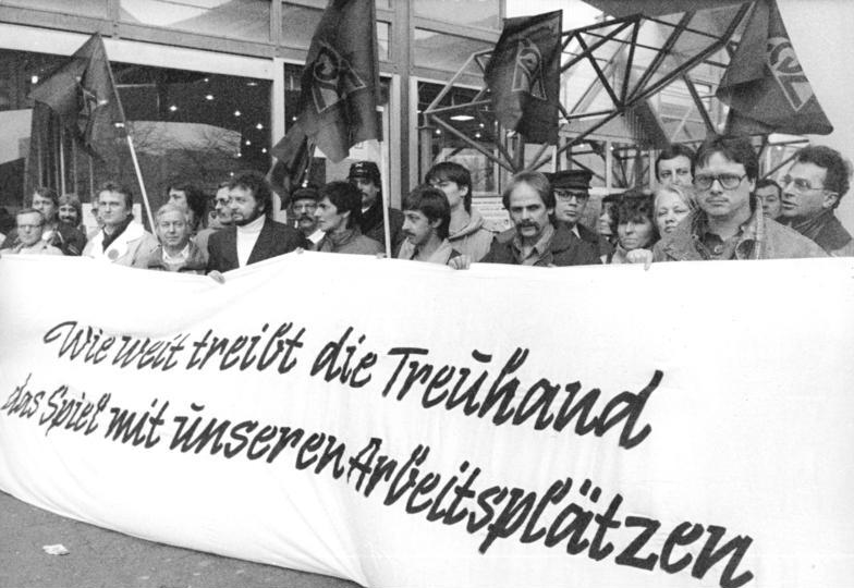 ADN- Klaus Franke 19.12.90 Berlin: Mitglieder der IG Metall, Betriebsräte und Belegschaftsmitglieder der Maxhütte Unterwellenborn GmbH forderten von den Verantwortlichen der Treuhand heute verbindliche Aussagen zum Stahl-Standort Unterwellenborn. Ihre Forderung: Erhalt des metallurgischen Zyklus - Stahlwerk, Hochofen und Walzwerk-. In ihrer Auffassung werden sie vom Thüringer Wirtschaftsminister Dr. Scholz unterstützt.